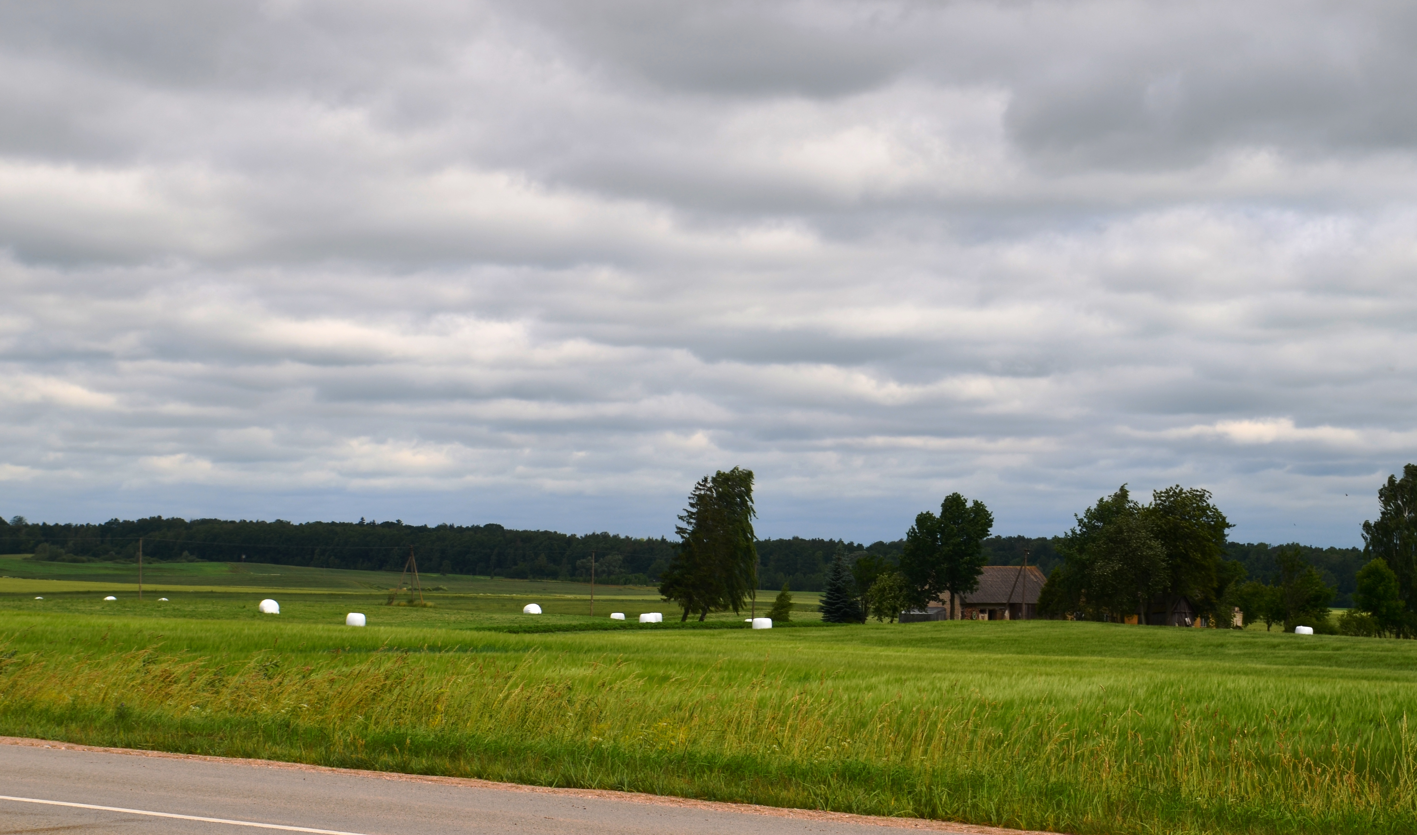 Paželsviai, Marijampolės sav.